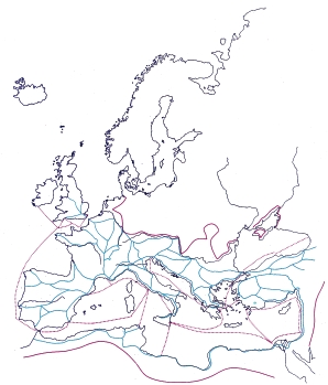 Erromatarren galtzadak Europan